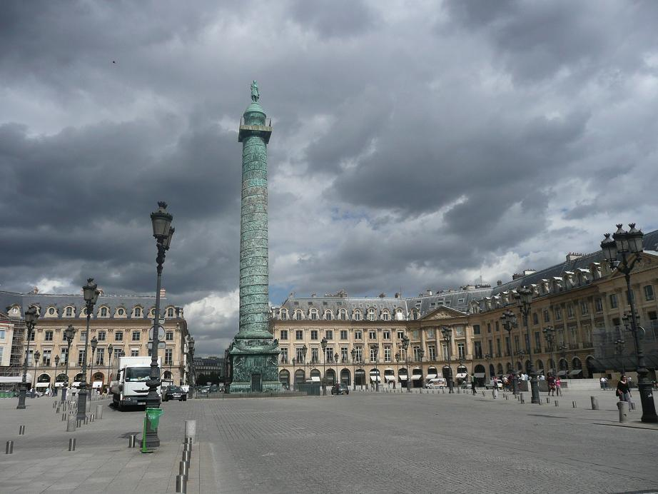 Place Vendôme, Paris